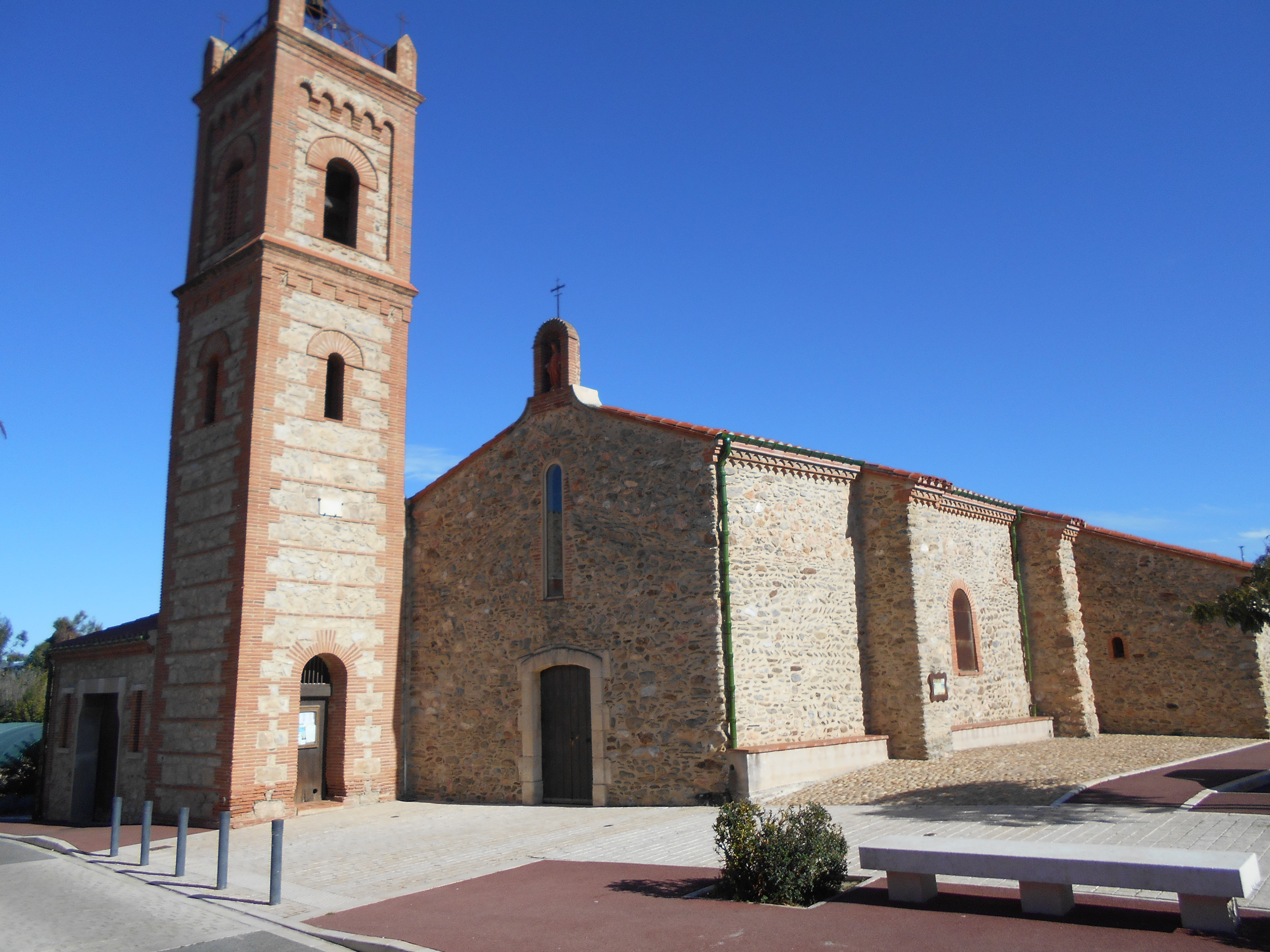 L'església de Santa Magdalena de Corbera la Cabana